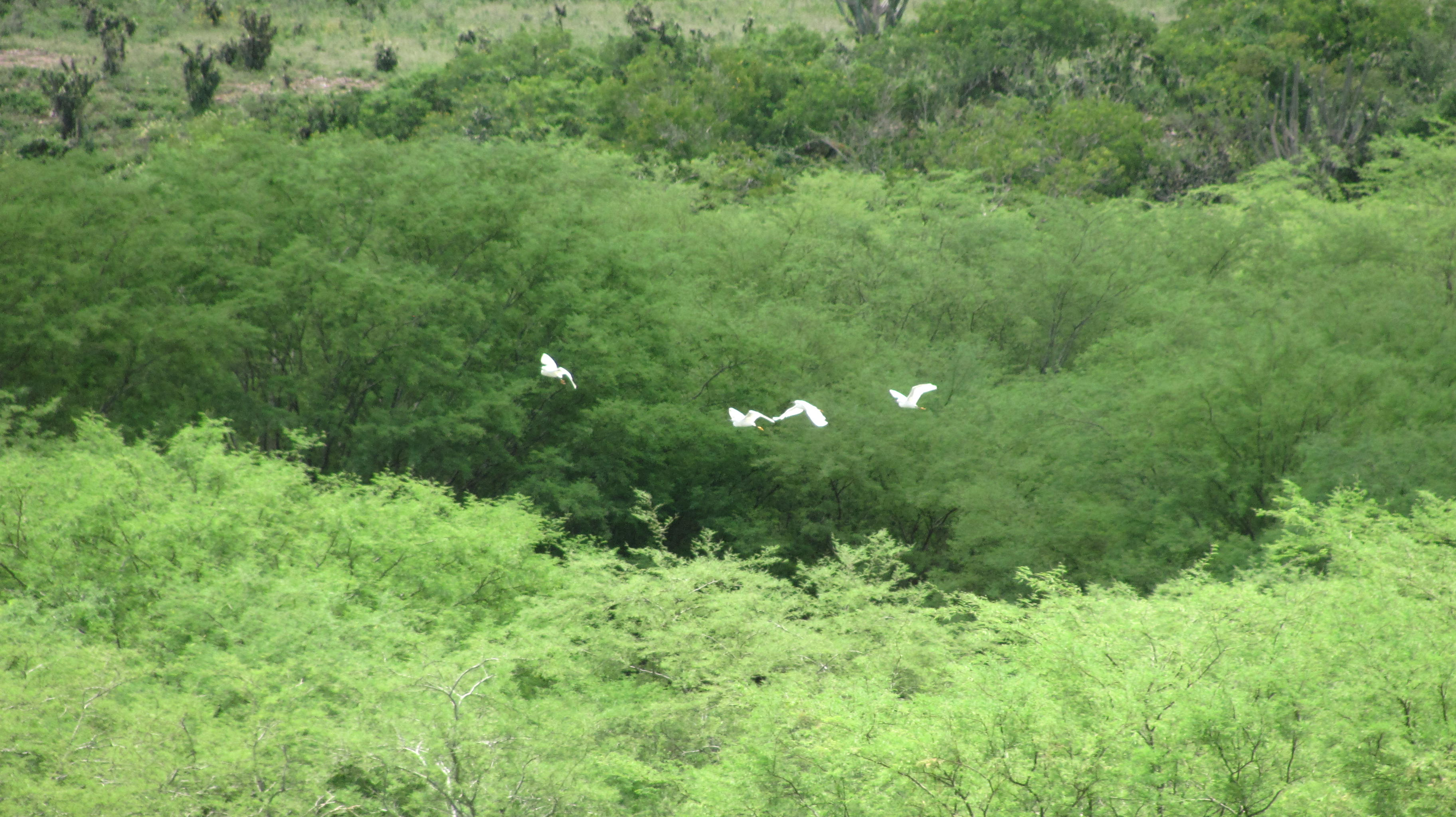 Barragem do Poço Grande, garças sobrevoando arvores nativas